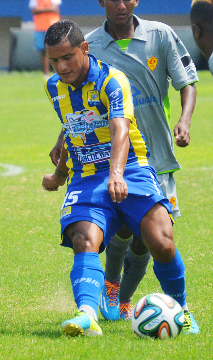 Cristhian Cedeño en Delfín Sporting Club de Manta en 2014